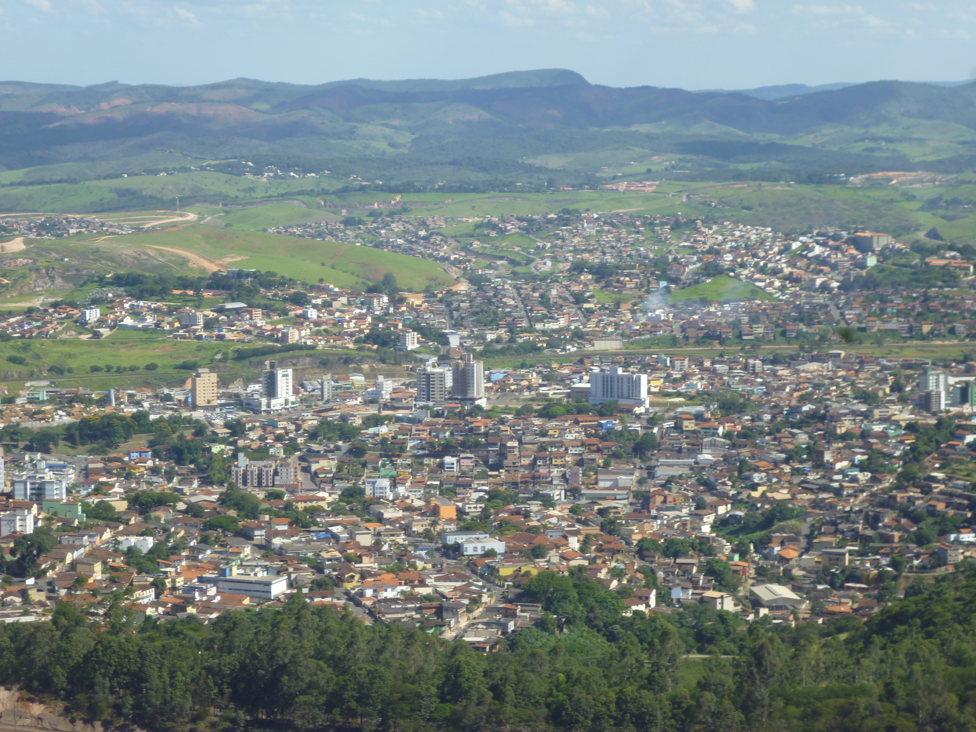 Itabira MG Brasil - Vista aérea